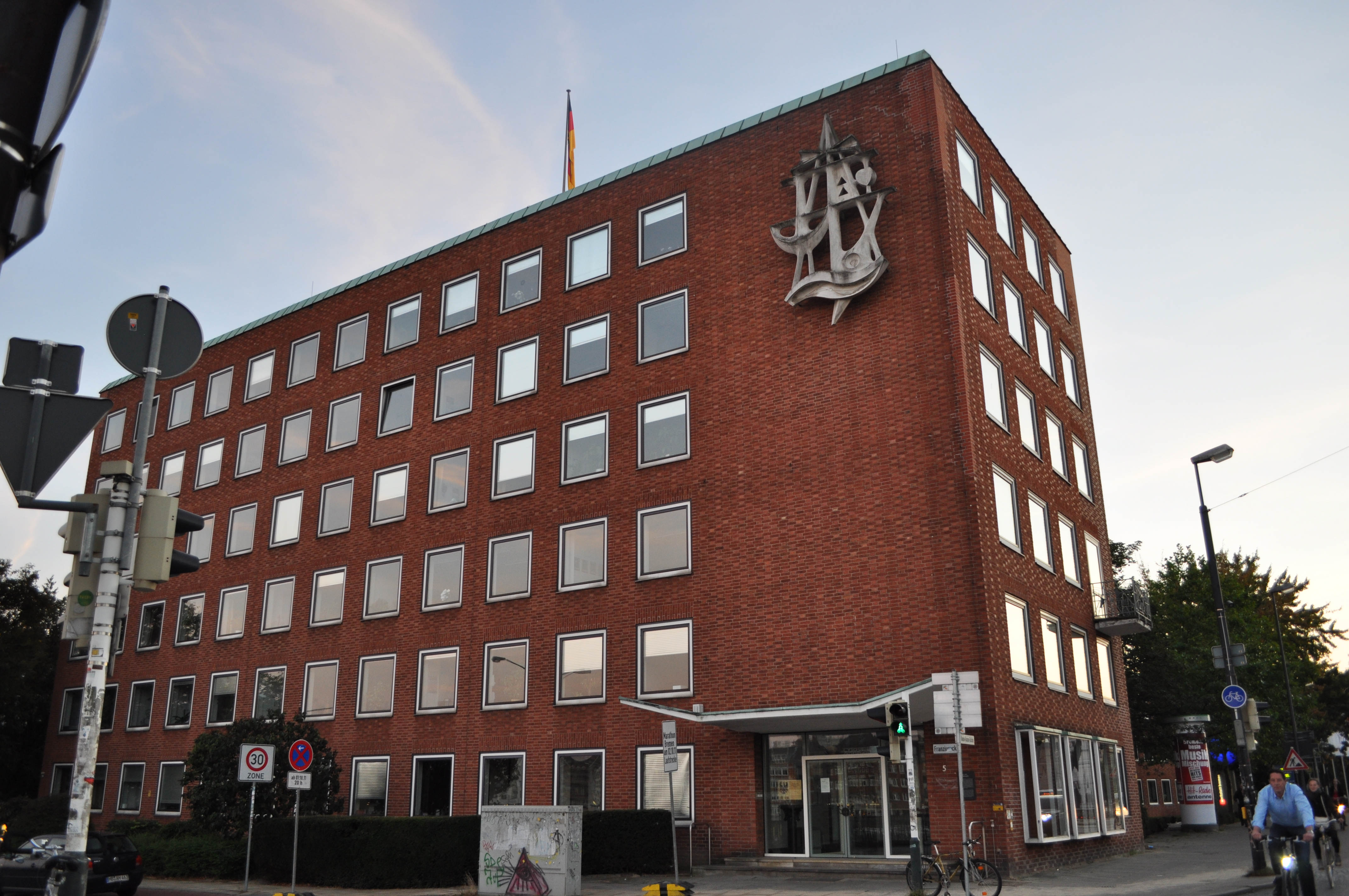 Wasser- und Schiffahrtsamt in Bremen, Franziuseck 5.Das abgebildete Objekt ist ein geschütztes Kulturdenkmal in der Freien Hansestadt Bremen, mit der Nr. 0063 beim Landesamt für Denkmalpflege registriert.